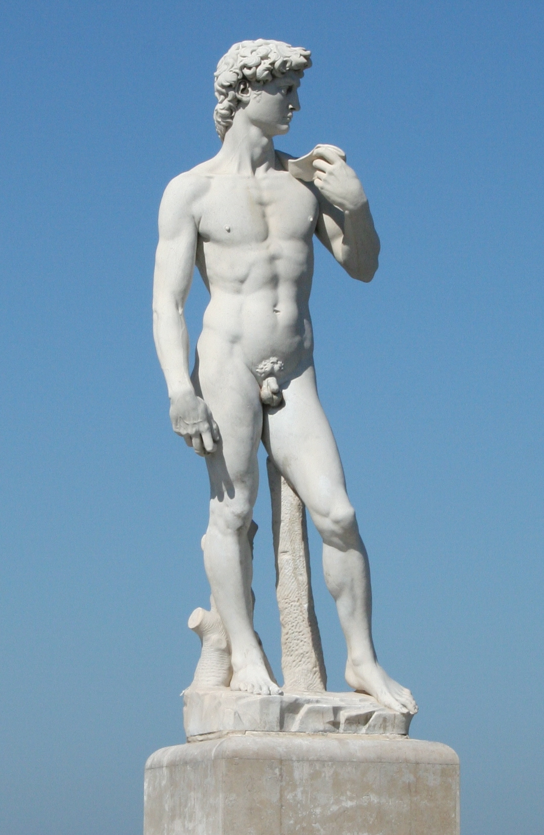 Statue de David à Marseille